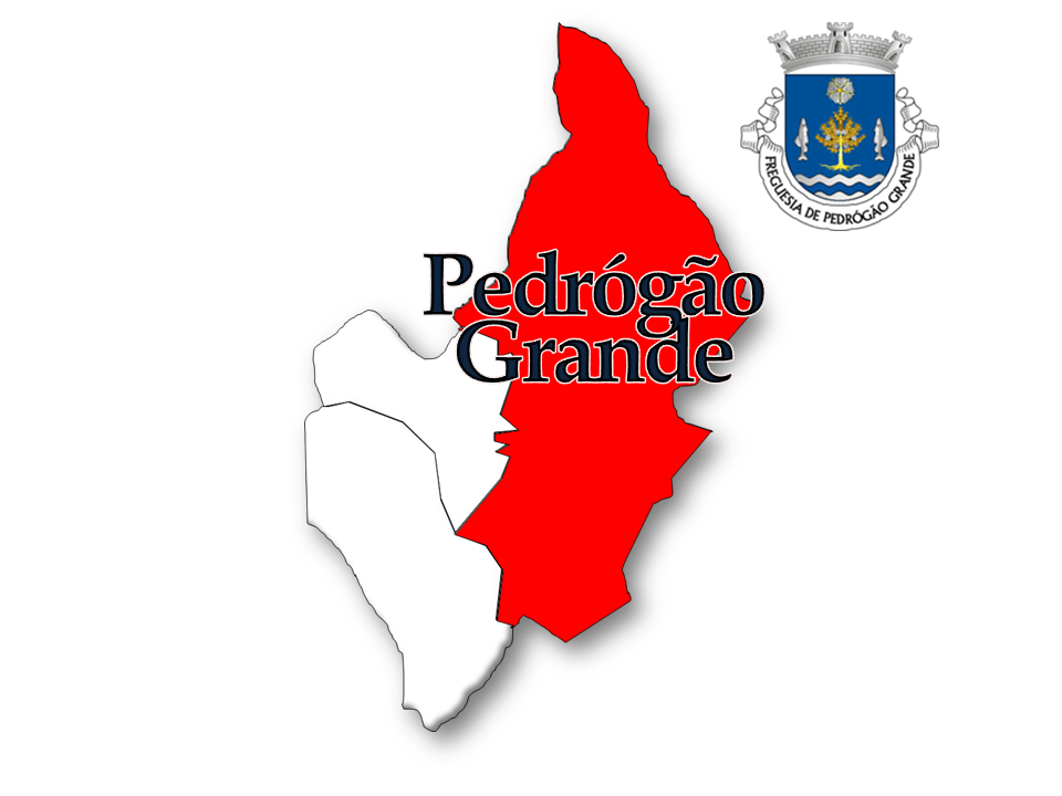 Evolução da População